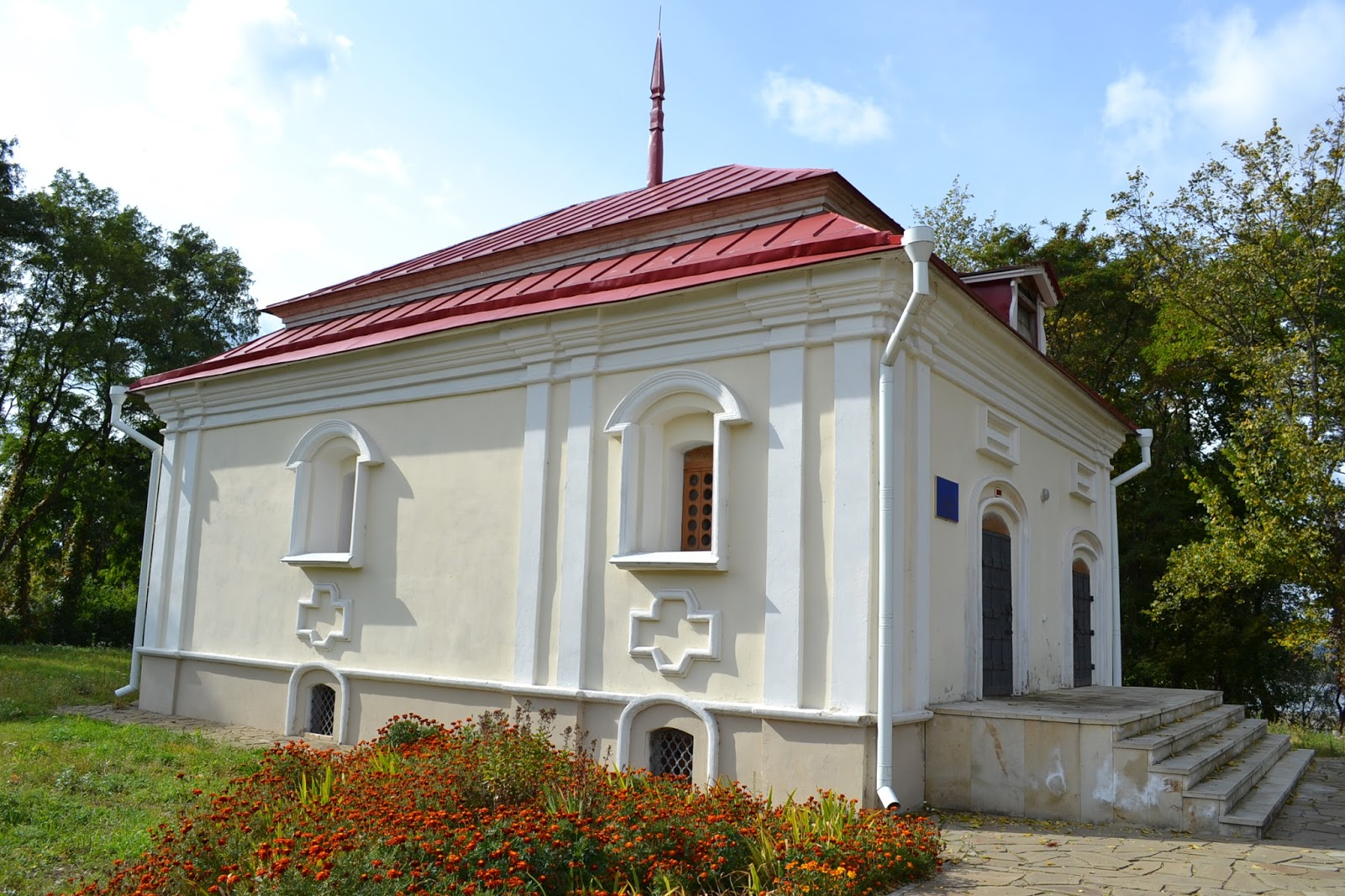 Зразок мурованої цивільної архітектури початку XVIII ст.